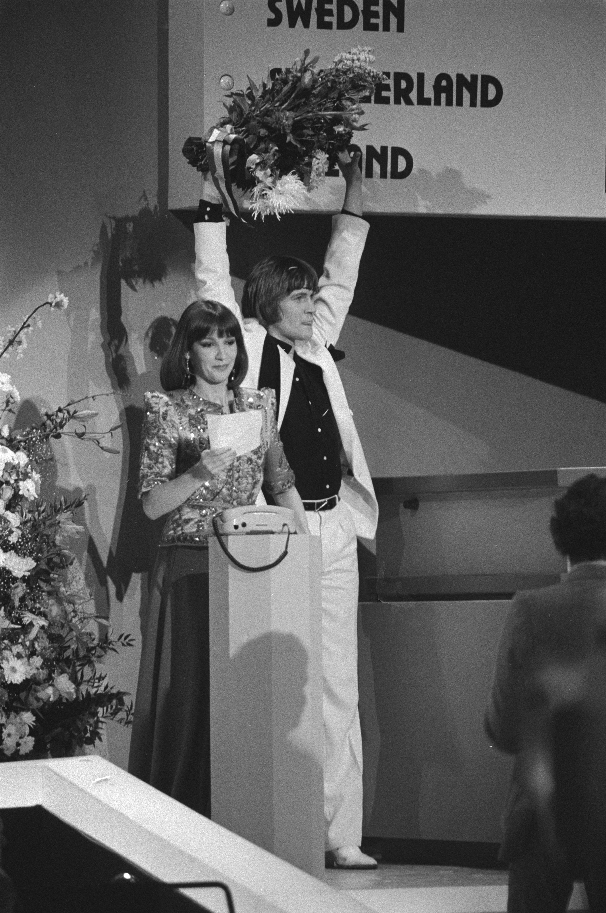 Collectie / Archief : Fotocollectie Anefo Reportage / Serie : [ onbekend ] Beschrijving : Eurovisie Songfestival 1980 (Den Haag); winnaar Johnny Logan en Marlous Fluitsma Datum : 19 april 1980 Locatie : Den Haag, Zuid-Holland Trefwoorden : songfestivals, winnaars Persoonsnaam : Fluitsma, Marlous, Logan, Johnny Fotograaf : Dijk, Hans van / Anefo Auteursrechthebbende : Nationaal Archief Materiaalsoort : Negatief (zwart/wit) Nummer archiefinventaris : bekijk toegang 2.24.01.05 Bestanddeelnummer : 930-7806